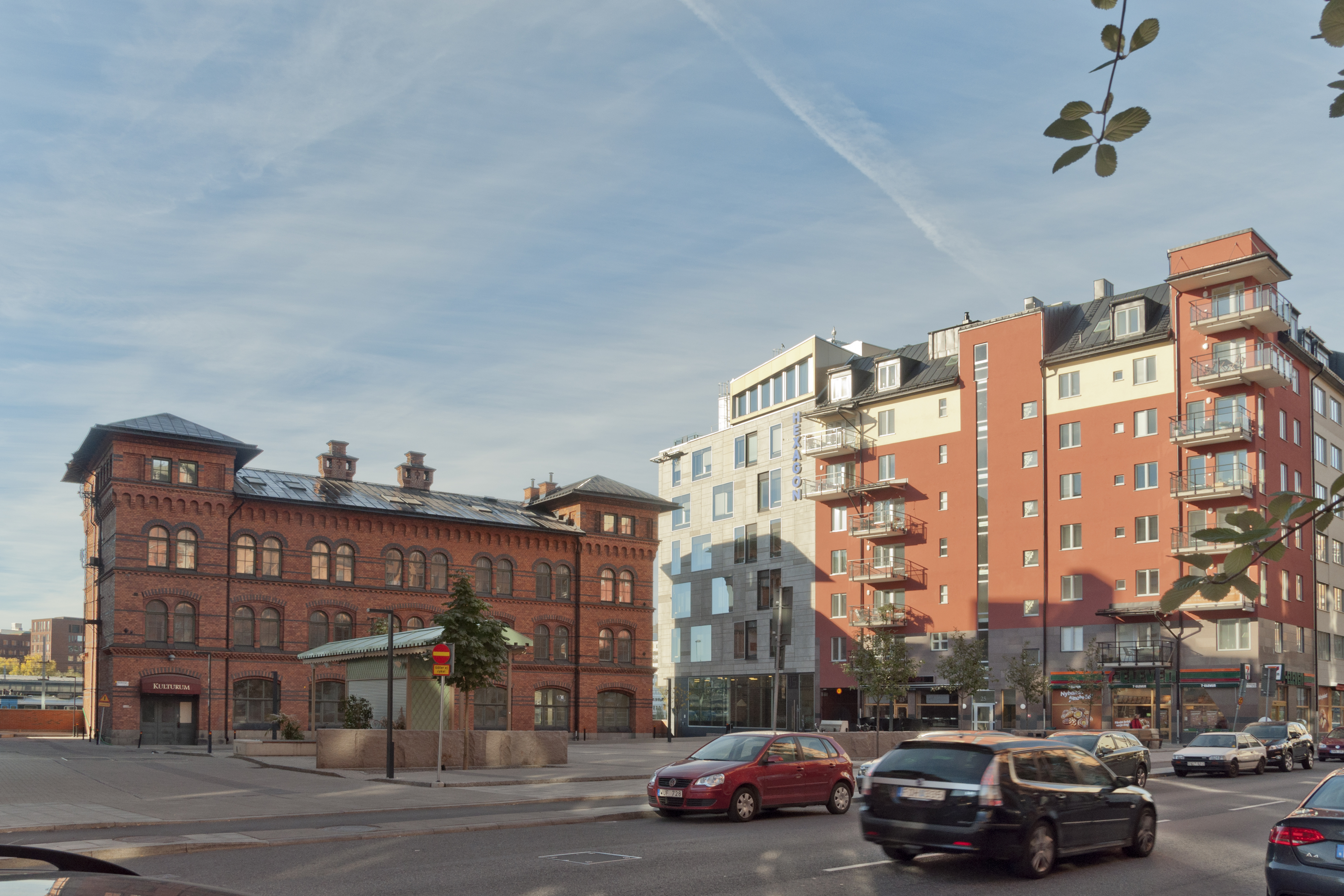 Lilla Bantorget. T.v. Expeditionshuset, tidigare Norra Station. Byggnadsår 1893. Arkitekt Folke Zettervall